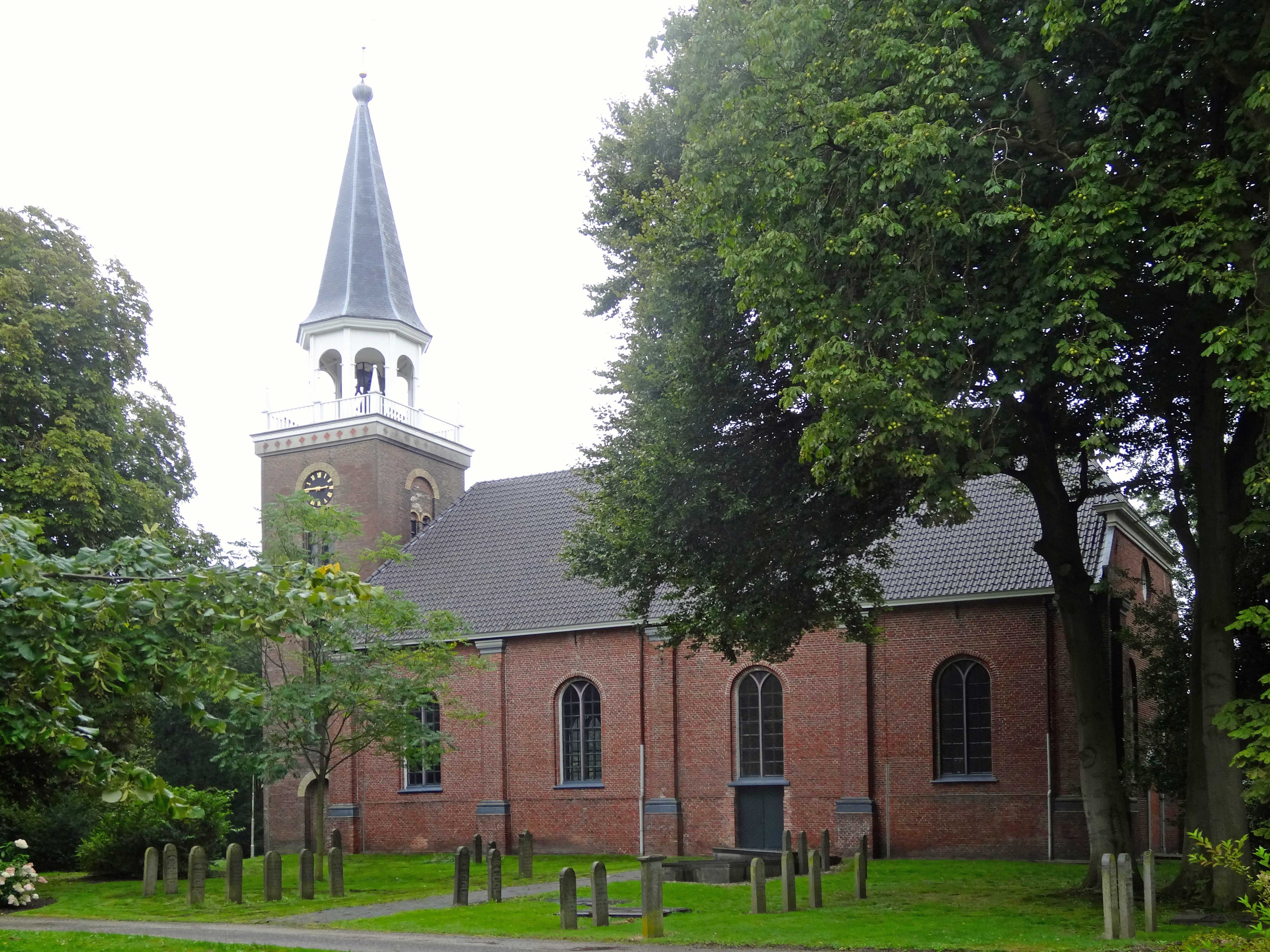 Kerk van Blijham